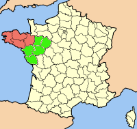 Les régions administratives françaises Bretagne et Pays de la Loire